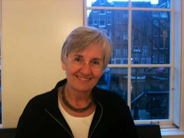 Betteke van Ruler